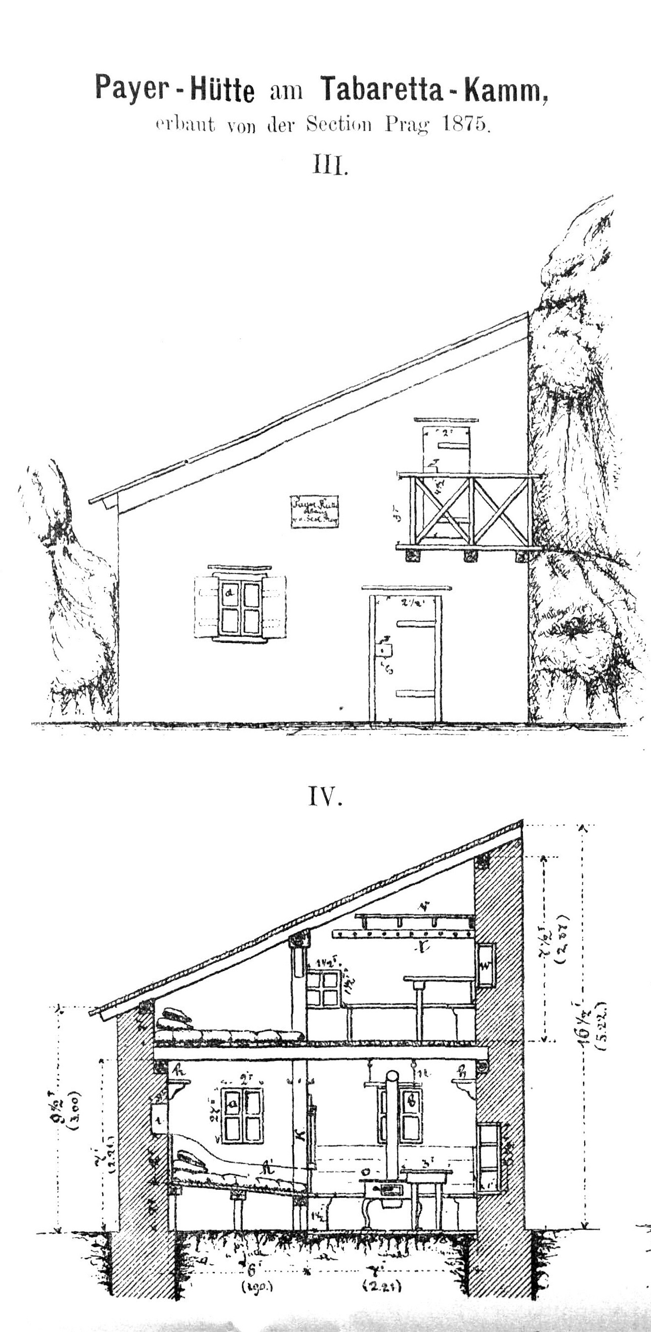 Entwurfszeichnung der Payerhütte aus Zeitschrift des Deutschen und Österreichischen Alpenvereins Bd.08 (1877)